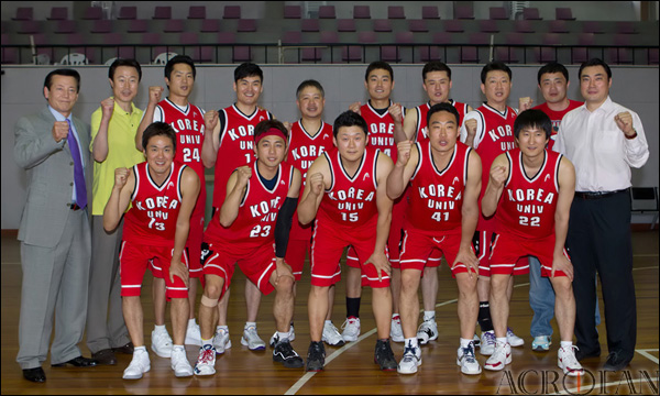 Again 1995! 농구 고연전(연고전) 미디어 데이